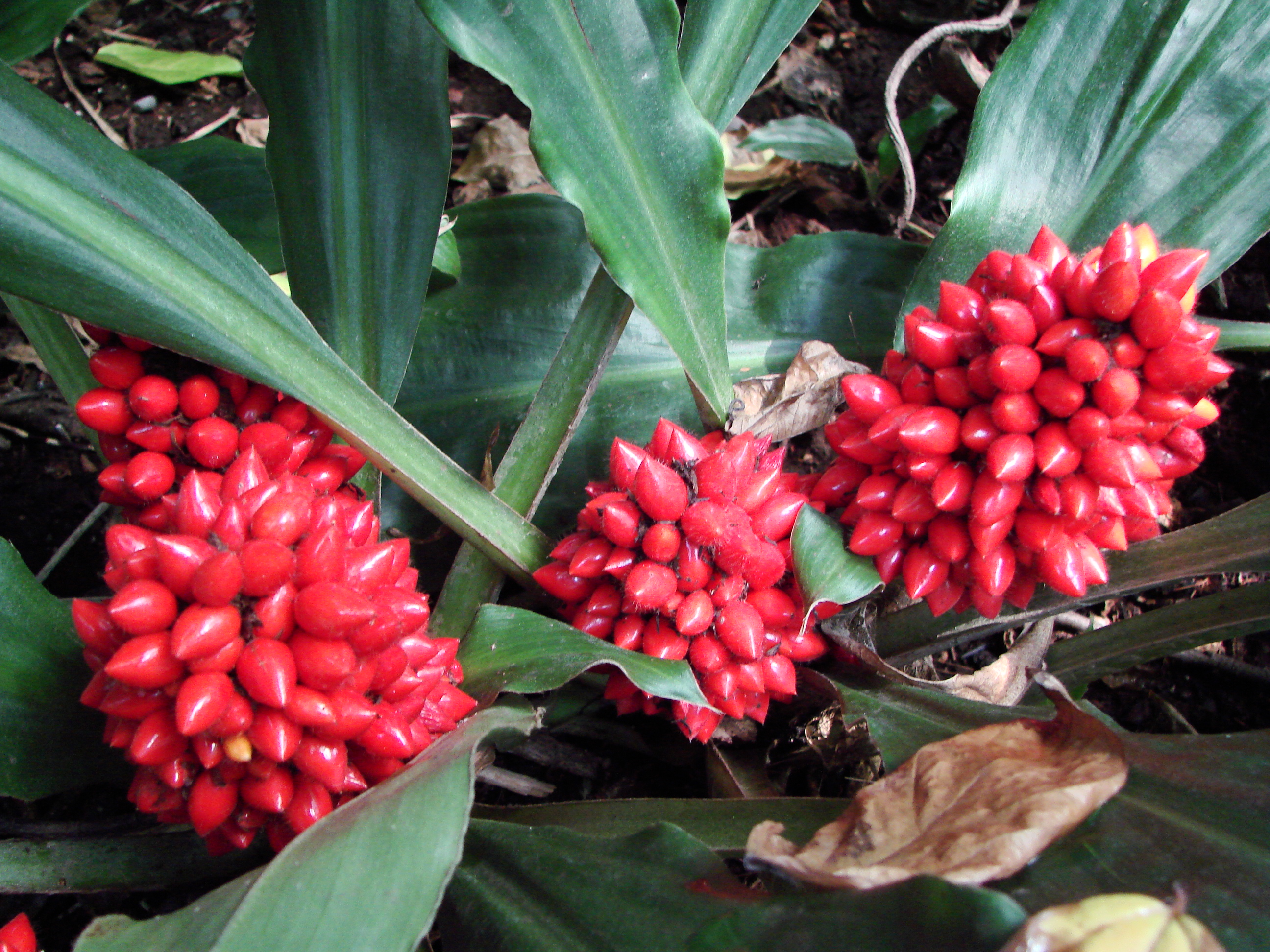 Jardin botanique de l'Université de Zurich (Suisse) : Palisota barteri Hook.